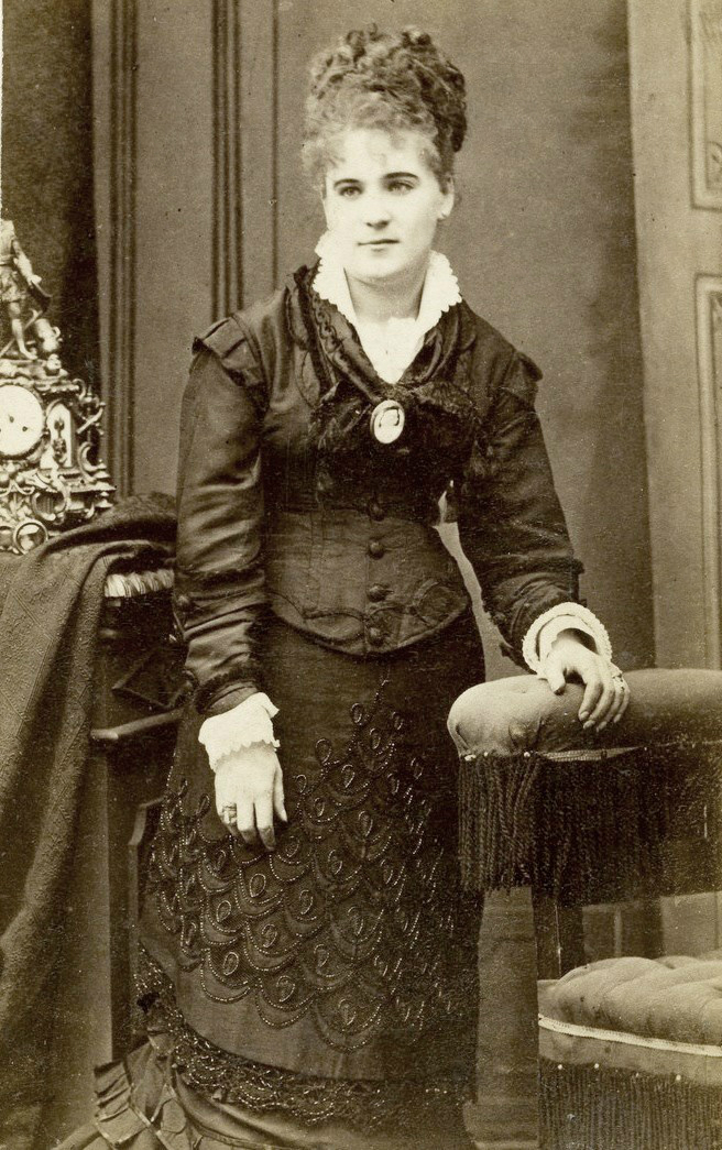 Fotografía de Marieta de Veintimilla (1855-1907) a los 20 años, en el Palacio de Carondelet. Autor desconocido, Quito.